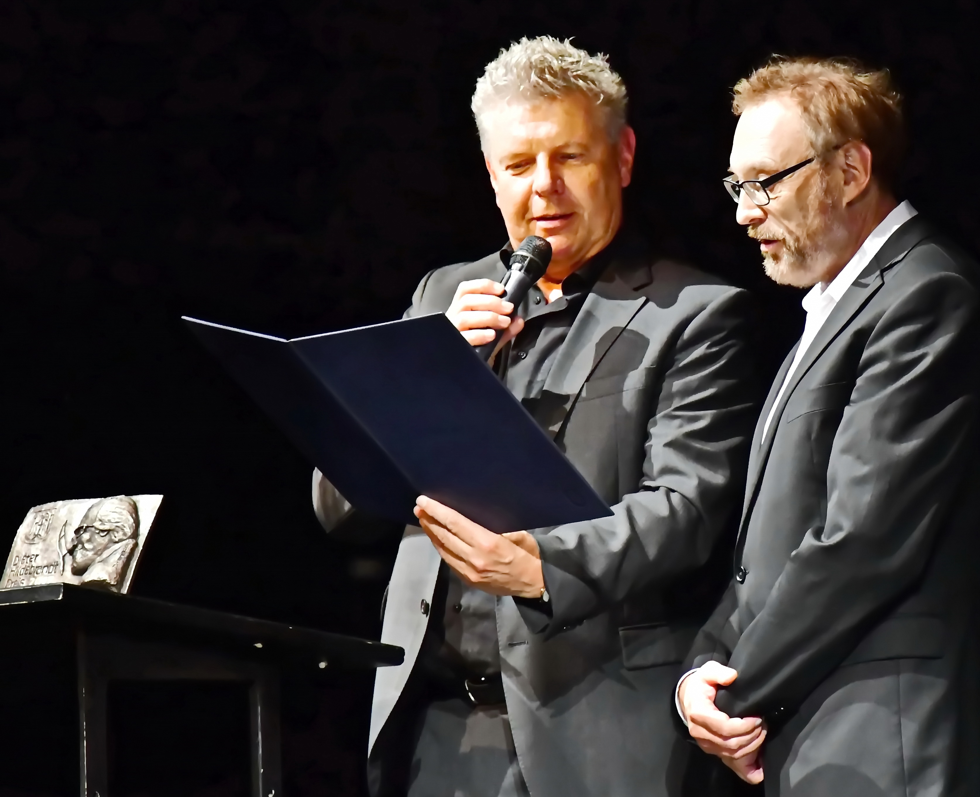 Josef Hader erhält den Dieter-Hildebrandtpreis 2017